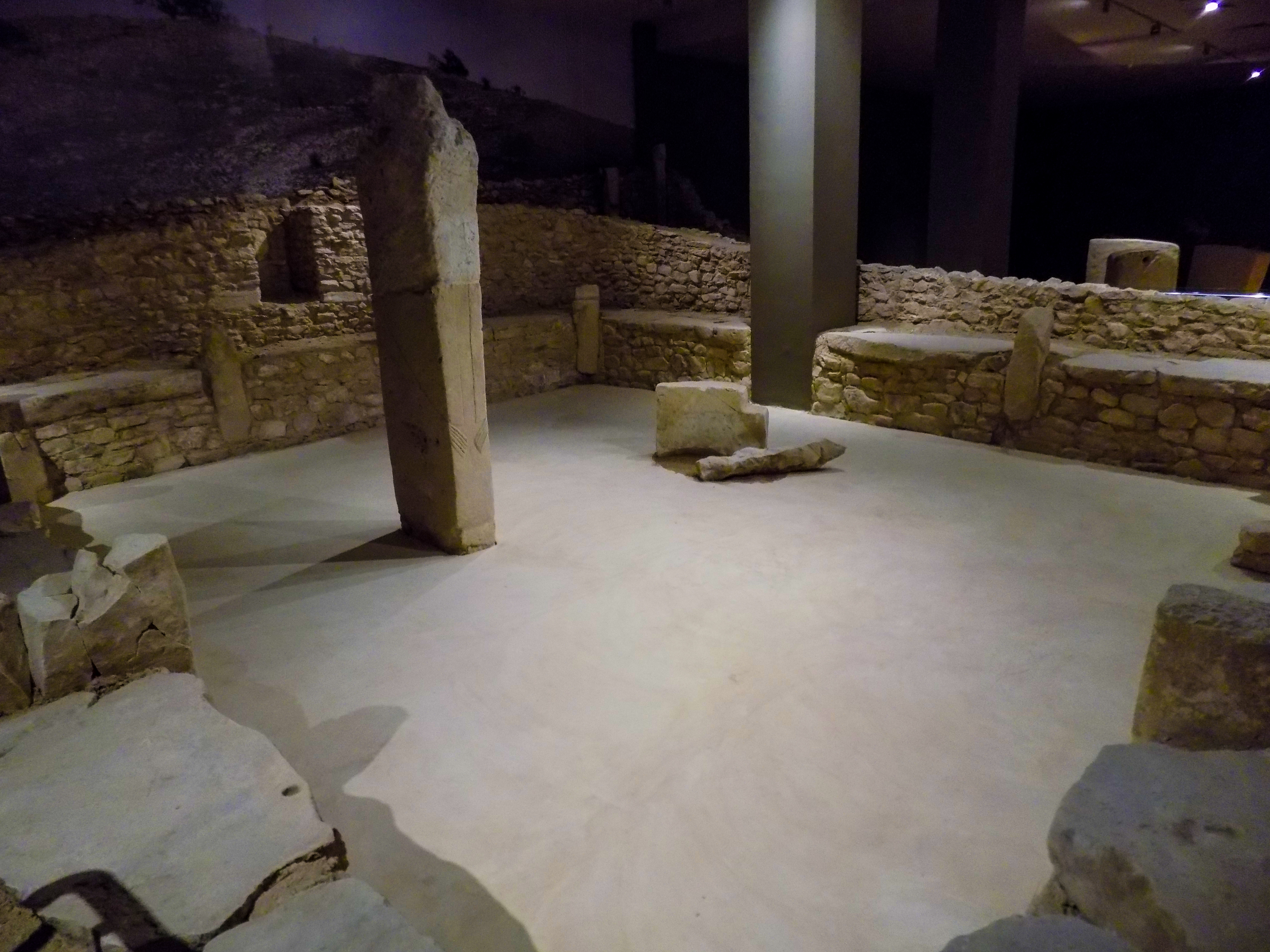 Dikilitaş Binası olarak da adladırılan tapınak kazılarda ortaya çıkarılan 29 yapı içerisinde kare plan gösteren tek yapı olup 14×14 metre boyutlarındadır. Bu tapınak Nevali Çori yerleşmesinin Neolitik tabakalarında açığa çıkarılan diğer tüm yapılardan konum, plan, boyut ve iç düzenlemesi olarak belirgin biçimde farklılık göstermektedir. Güneydoğu Anadolu Bölgesi'nde kült yapılarının konut alanı dışında inşa edilmesi çanak çömleksiz Neolitik Çağın b evresi başlarından itibaren genel bir eğilim haline gelmiştir. Binanın iki yapı evresi olduğu anlaşılmaktadır. İkinci evre, ilk evrenin birinci tabakasındaki yapının yenilenmesi olup bazı yapı elemanlarının yeniden kullanıldığı anlaşılmaktadır. Tapınağı çevreleyen duvarların iç tarafı boyunca büyük yassı taşlarla yapılmış bir seki bulunmaktadır. Seki üzerine belirli aralıklarla dikilmiş 12 taş bulunmaktadır. Orta kısmında iki dikilitaş daha bulunur. Bu dikilitaşın yüksekliği 2.35 metre olarak ölçülmüştür. Her iki geniş yanında aşağıya doğru belirli bir eğim göstererek devam eden iki insan kolu kabartması yer alır. Bunlar da r yüze bükülerek elleri oluşturur. Buna göre bu dikilitaşların Göbeklitepe'deki gibi stilize insan heykelleri olduğu düşünülmektedir. Tabanın, duvarların ve dikilitaşların yapımında konut amaçlı bir binada gösterilmesi beklenebilecekten daha fazla bir özen gösterildiği ve çaba harcandığı anlaşılmaktadır.